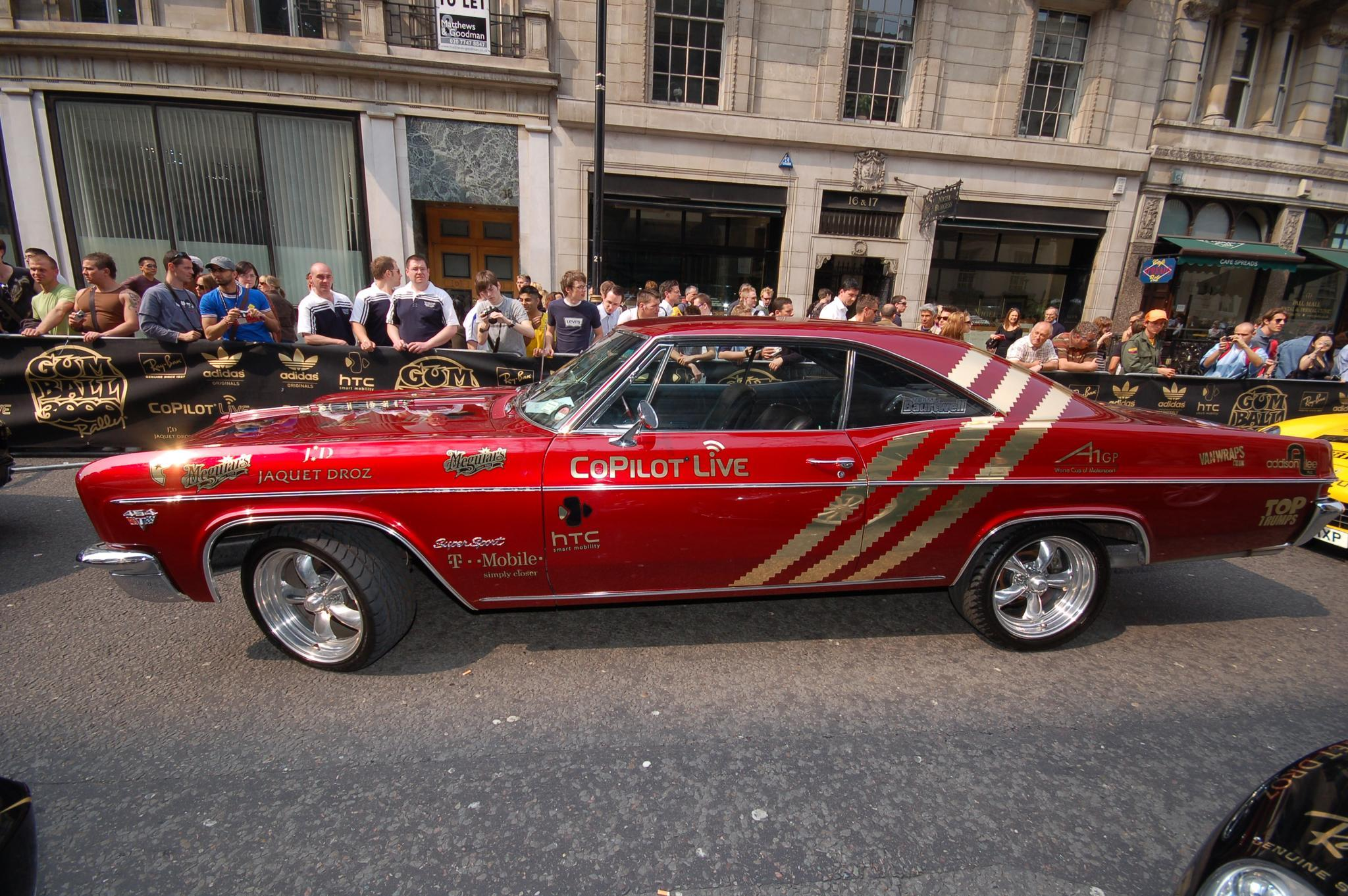 US-Sportwagen beim Gumball 2007.